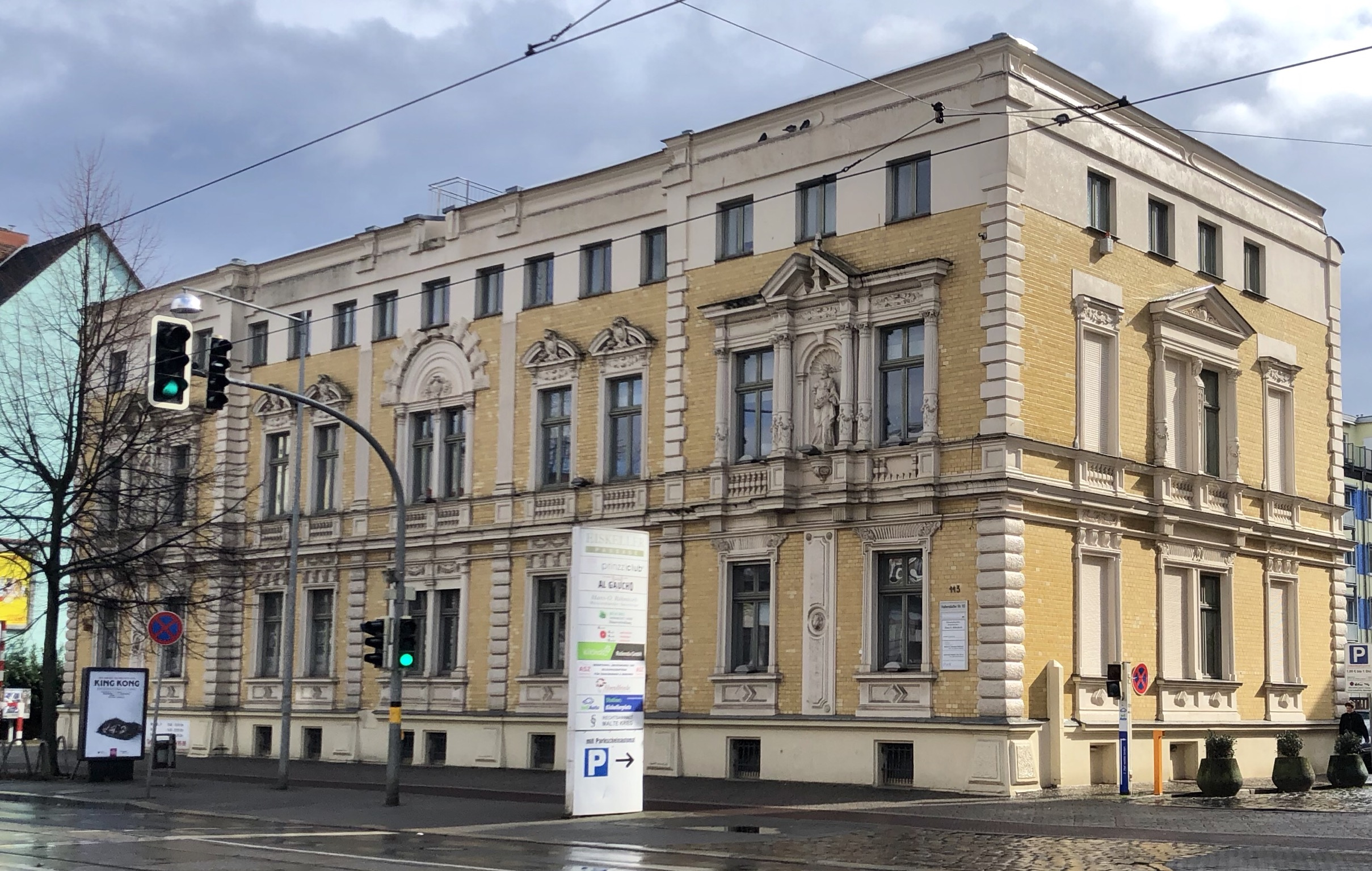 Halberstädter Straße 113 in Magdeburg